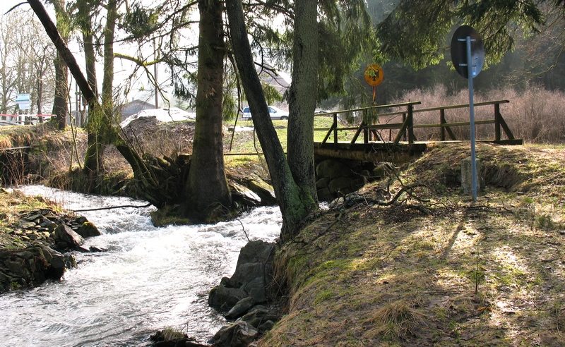 Zusammenfluss von Pöhlwasser und Goldbach am Grenzübergang Ehrenzipfel